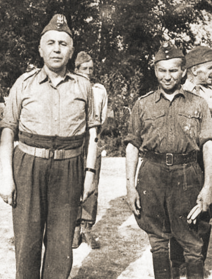 Józef Gawlina, biskup polowy Armii Andersa (po lewej) i Leopold Okulicki ps. Niedźwiadek - późniejszy ostatni komendant główny Armii Krajowej (po prawej). Zdjęcie z kolekcji Stanisława Szlachciuka.